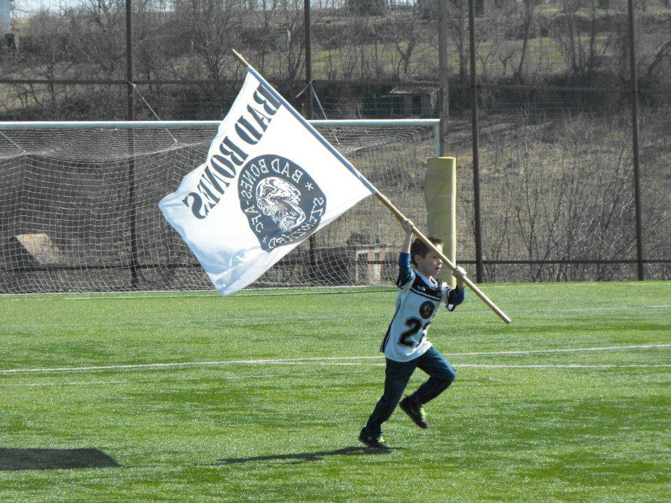 Csapatzászló az első nagypályás mérkőzésen